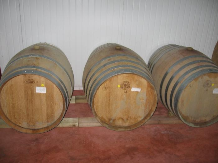 חביות ביקב